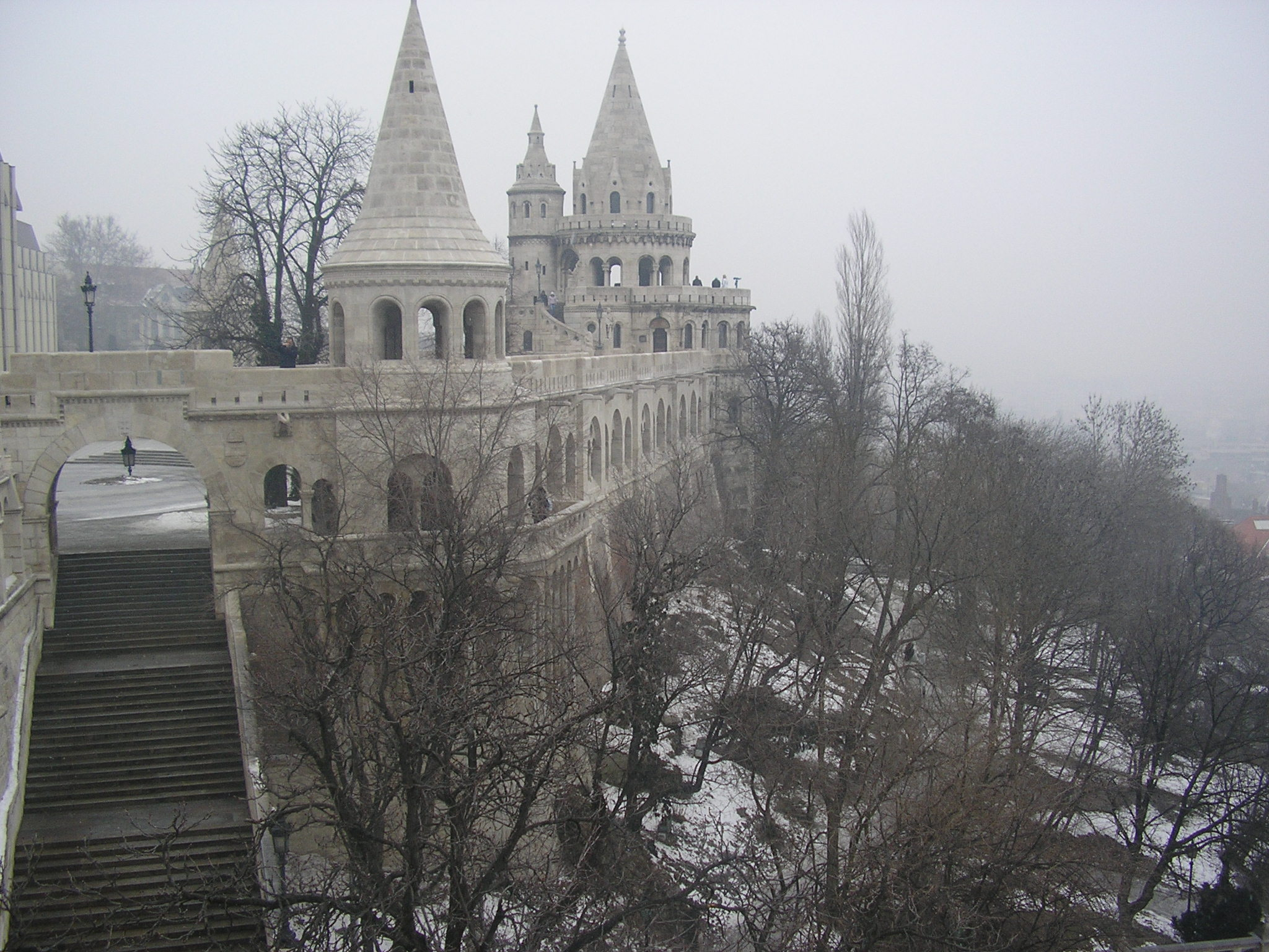 מצודת הדייגים בבודפשט.